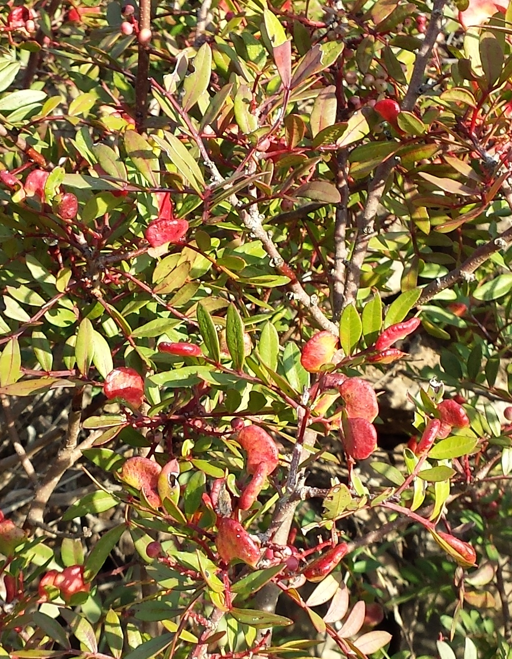 Agalles (Aploneura lentisci) en una mata de llentiscle (Pistacia lentiscus) a Castelltallat, Bages